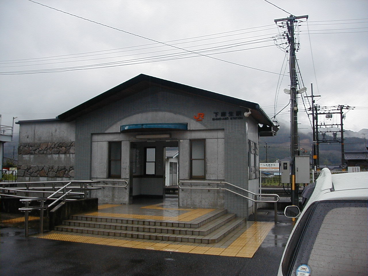 岐阜県加茂郡川辺町 下麻生駅にて撮影